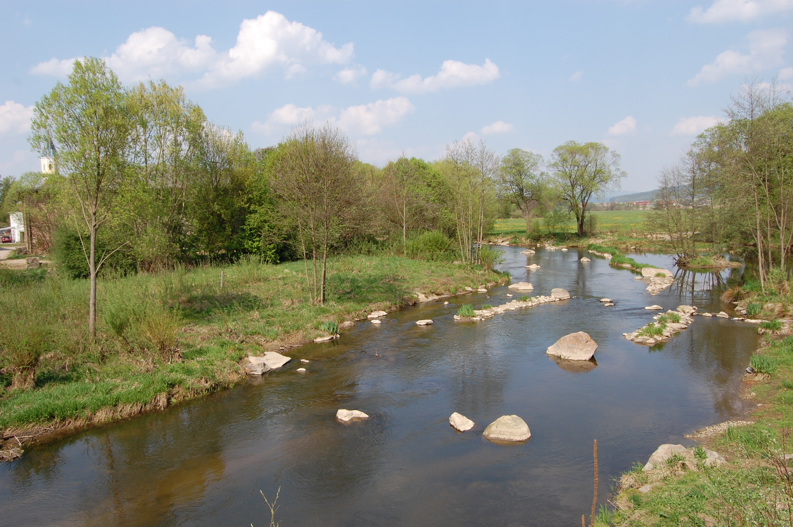 Der Fluss Schwarzach bei Schönthal, Landkreis Cham, Oberpfalz, Bayern (2011)